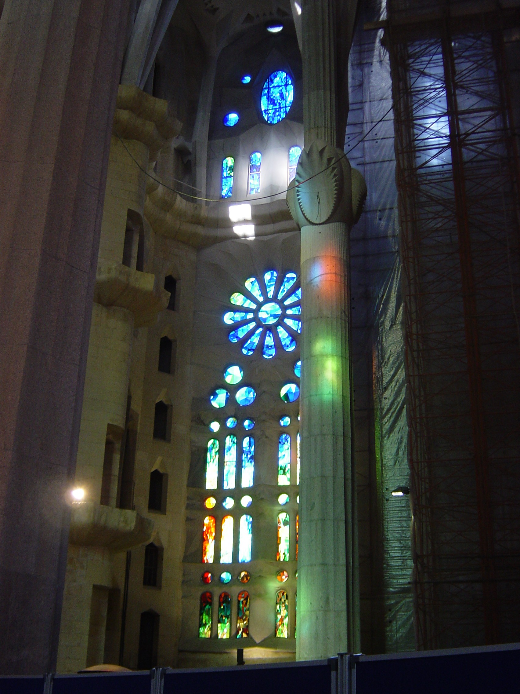 サグラダ・ファミリア教会内装、バルセロナ、スペイン